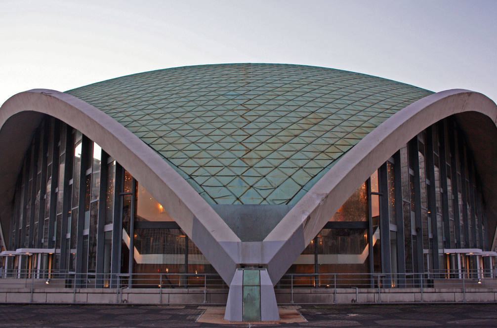 Oper am Platz der alten Synagoge, Dortmund